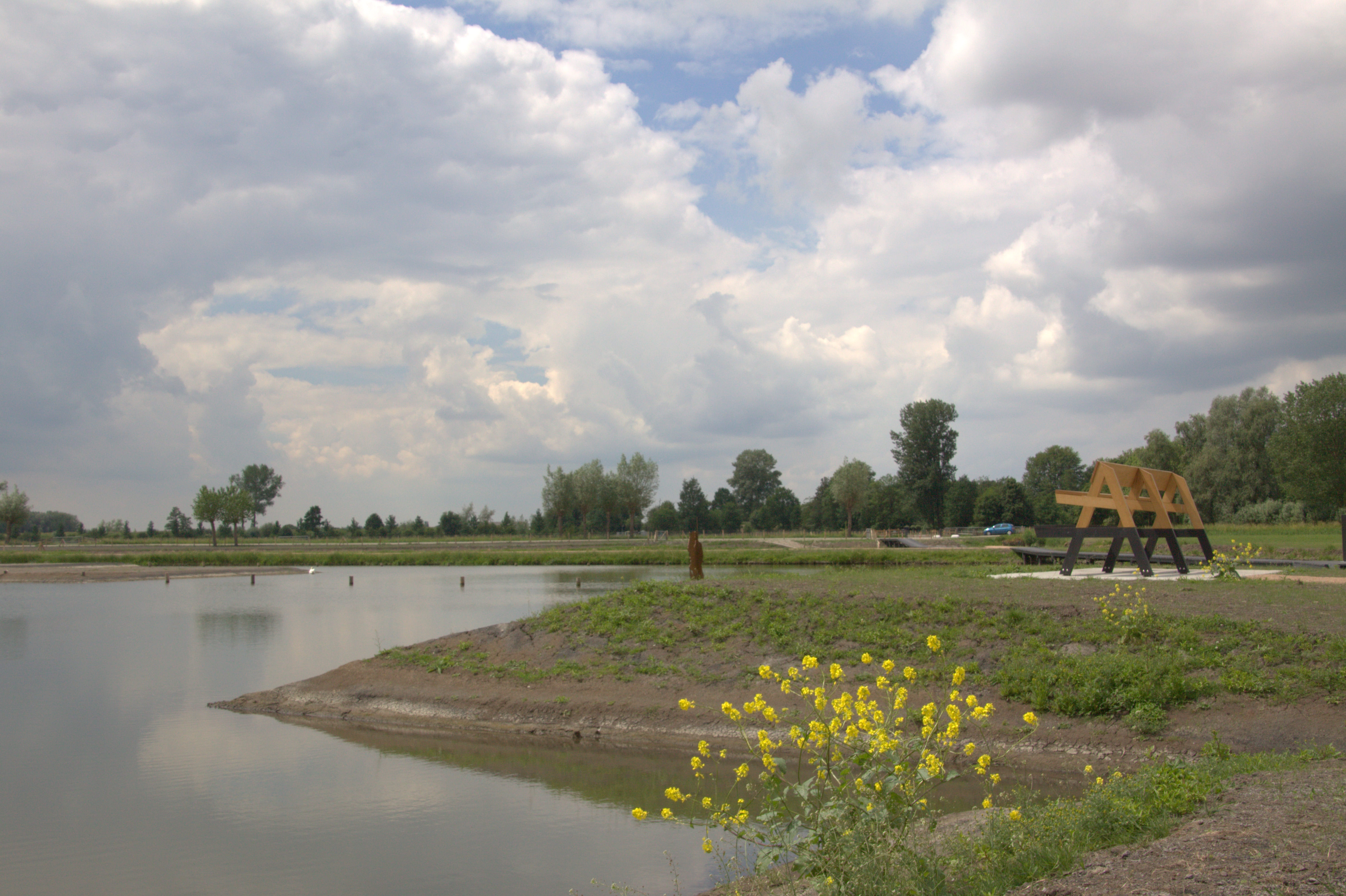 De waterberging gezien in oostelijke richting naar de Achterdijk bij Schalkwijk.